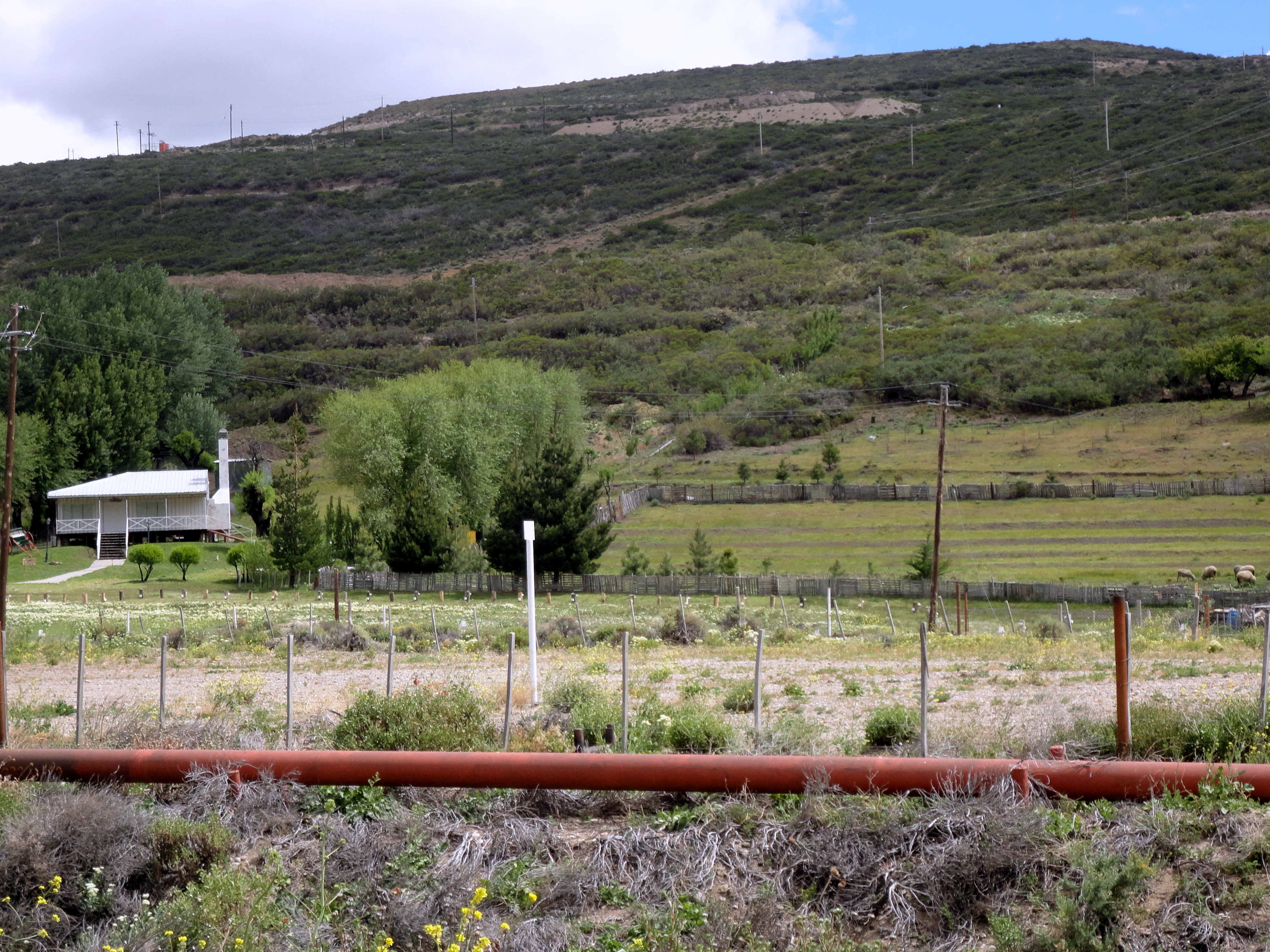 Vivendas aun habitadas por estancieros en las inmediaciones al yacimiento